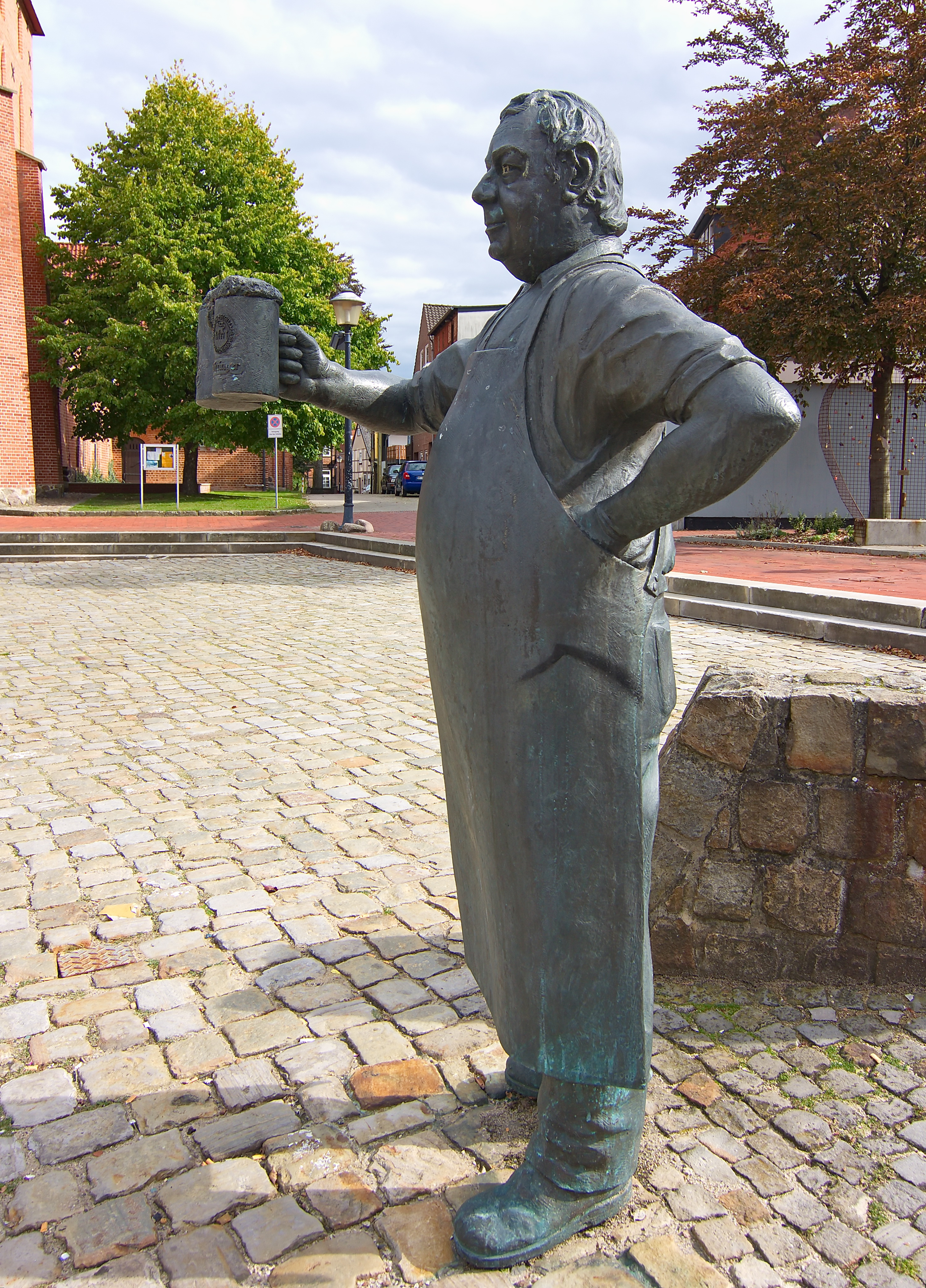 Skulptur von Georg Arfmann in Wittingen, Niedersachsen, Deutschland